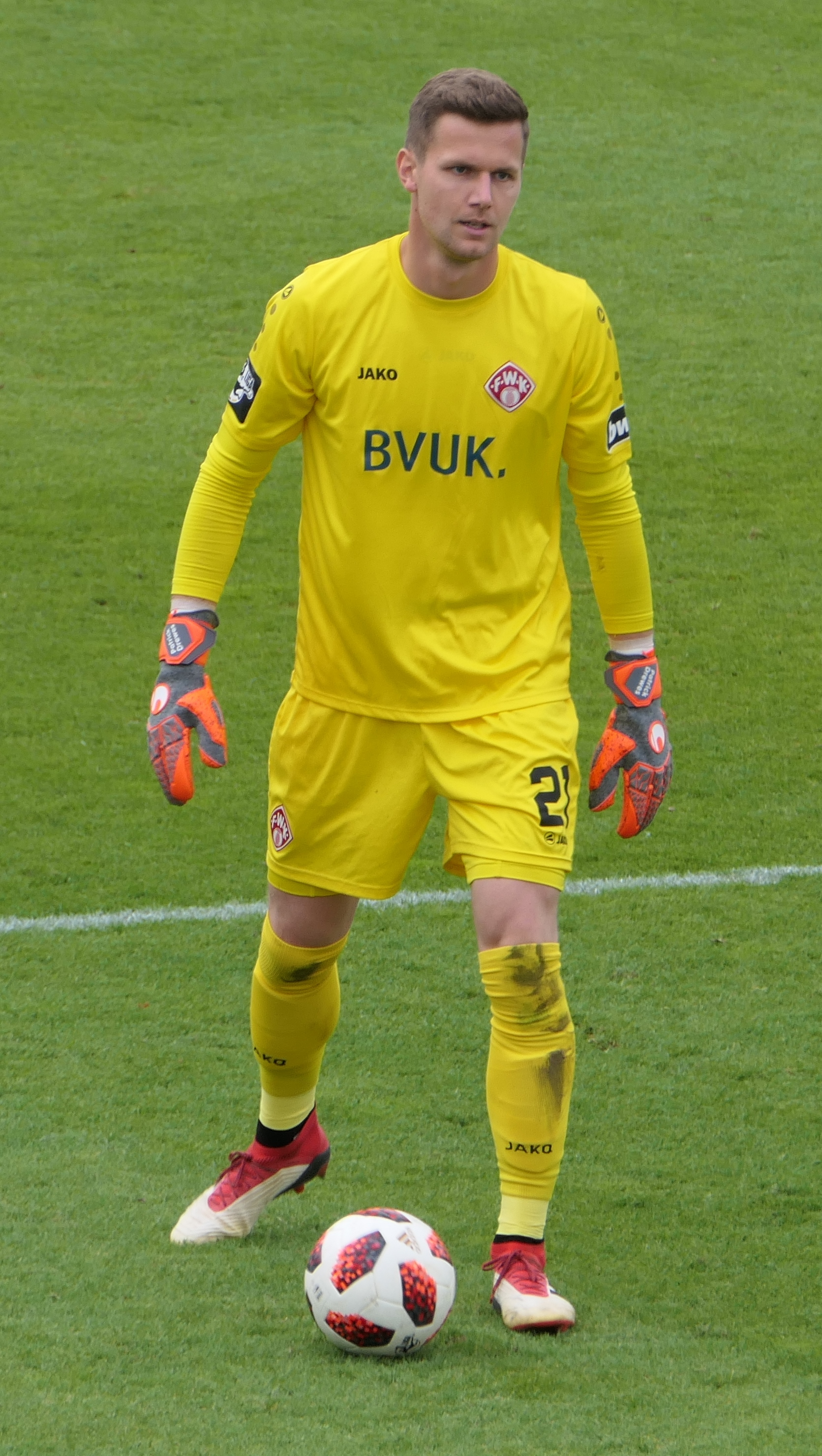 Der Fussballprofi Patrick Drewes im Trikot der Würzburger Kickers beim Heimspiel gegen Eintracht Braunschweig am 22.09.2018.